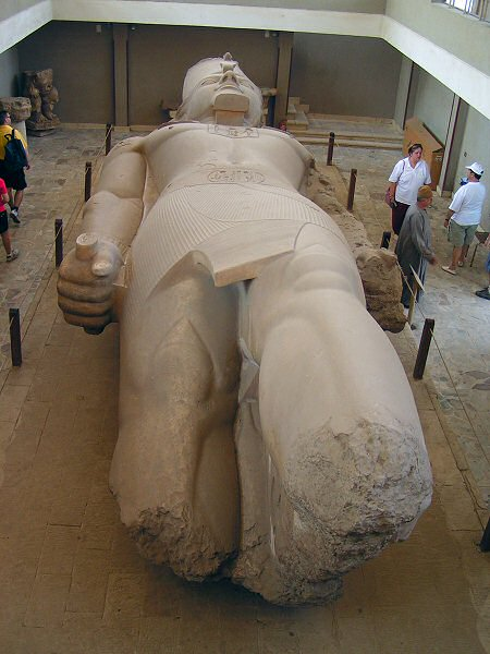 Statue von Ramses II. im ägyptischen Memphis (in der Nähe von Kairo) Fotografiert am 4. Oktober 2003